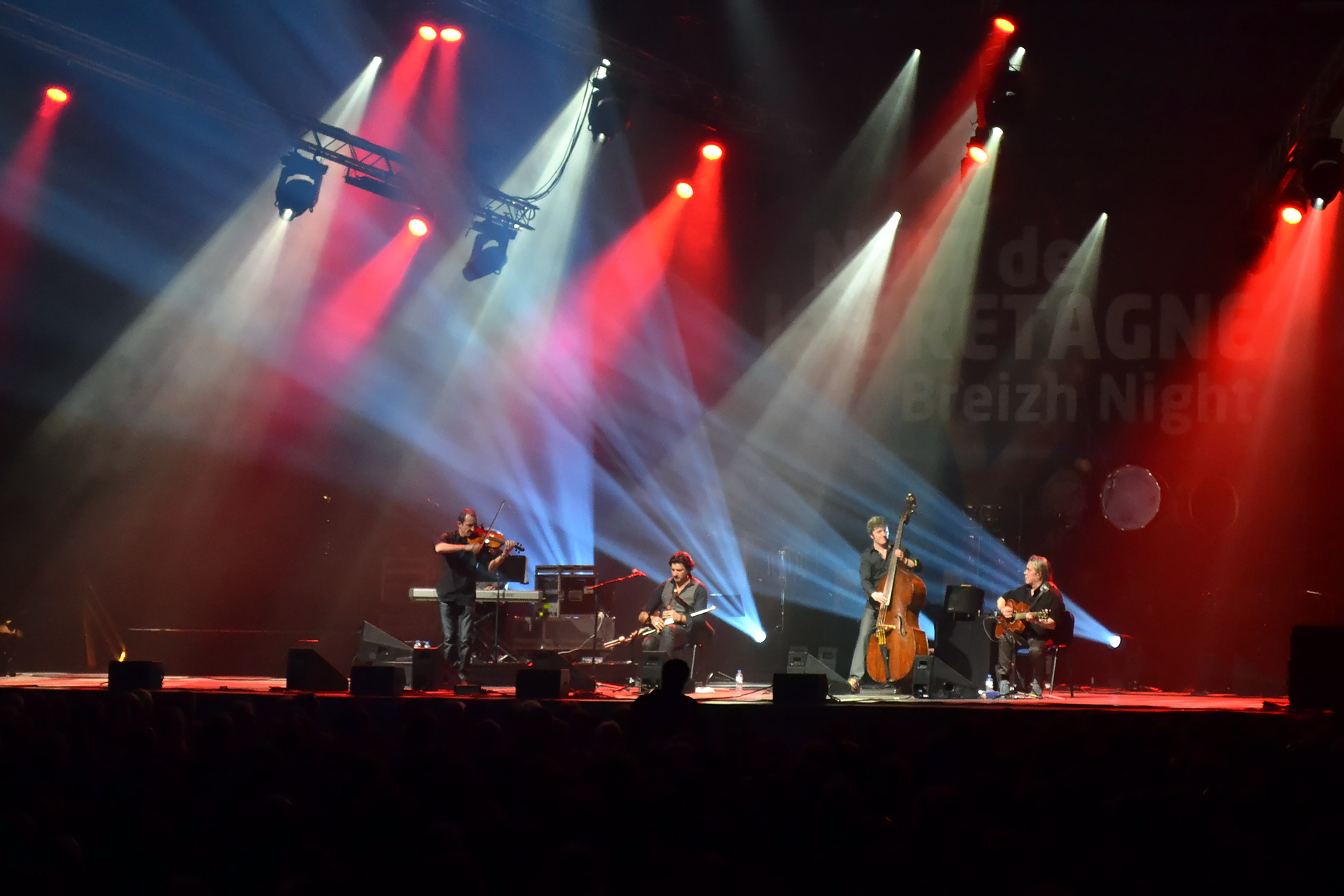 Ronan Le Bars Group en concert pour la Nuit de la Bretagne au parc de Langolvas le 11 janvier 2014.